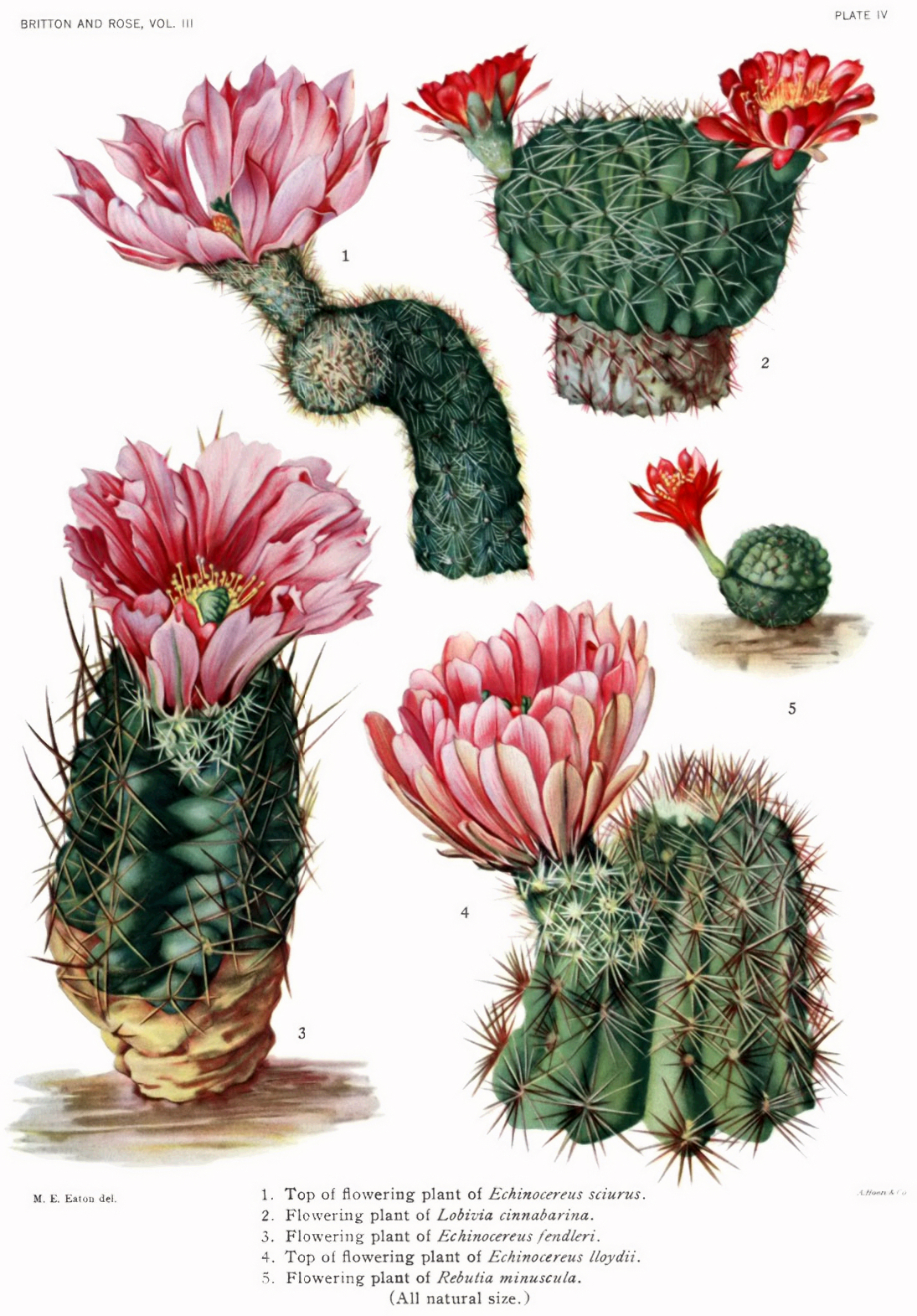 Echinocereus sciurus Lobivia cinabarina (now Echinopsis cinnabarina) Echinocereus fendleri Echinocereus lloydii (now Echinocereus x roetteri) Rebutia minuscula